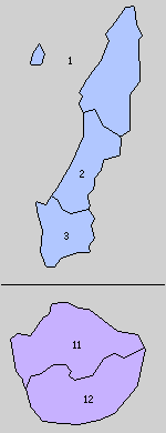 後の鹿児島県熊毛郡域の町村制時点の町村。